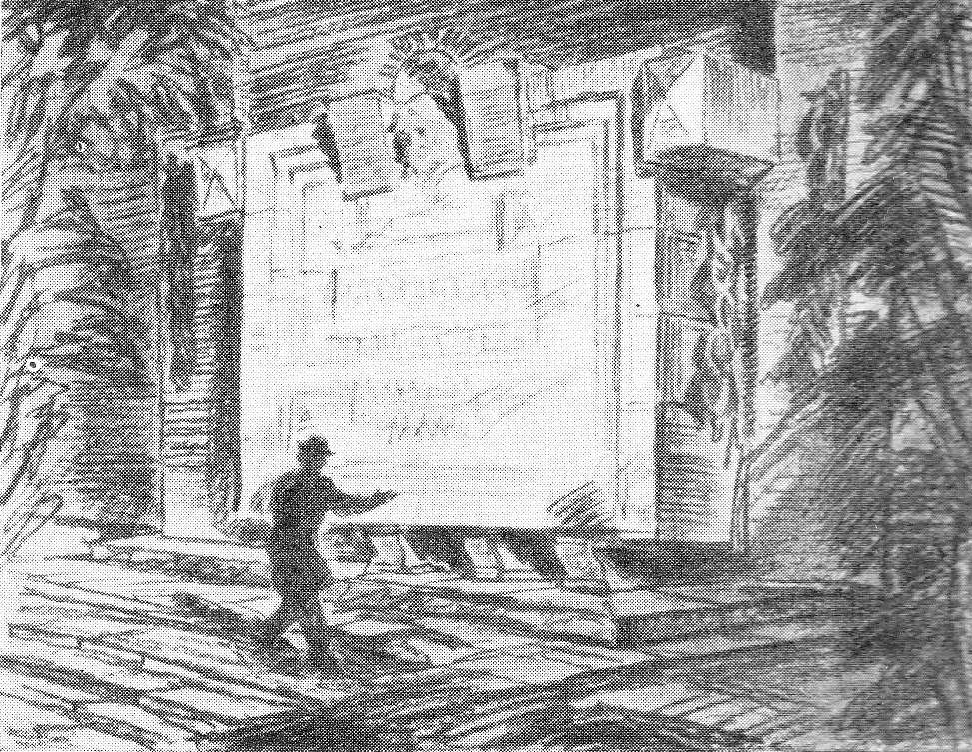 Конкурсный проект мемориальной доски на Красной площади над братской могилой участников революции